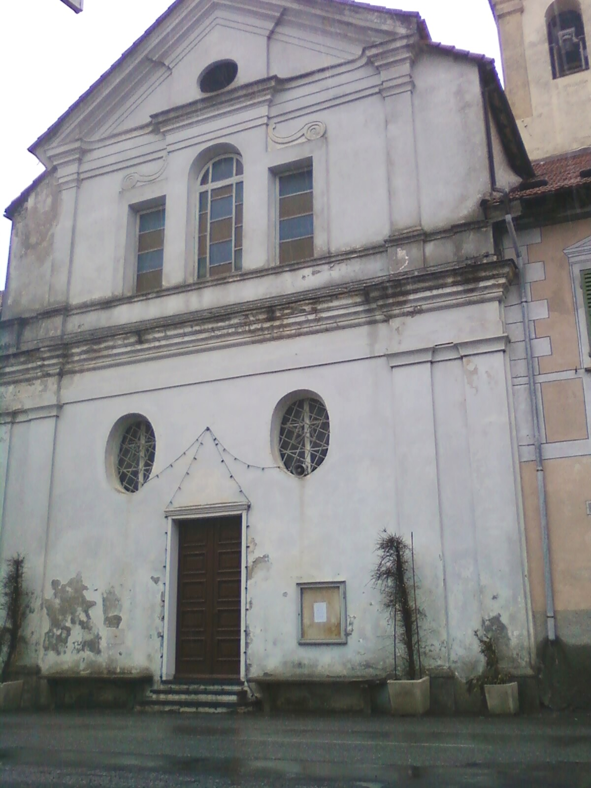 Chiesa della Madonna del Carmine a Pontinvrea SV (Italy)